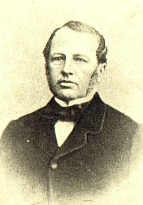 Роберт Клеменц, соучредитель Санкт-Петербургского частного коммерческого банка